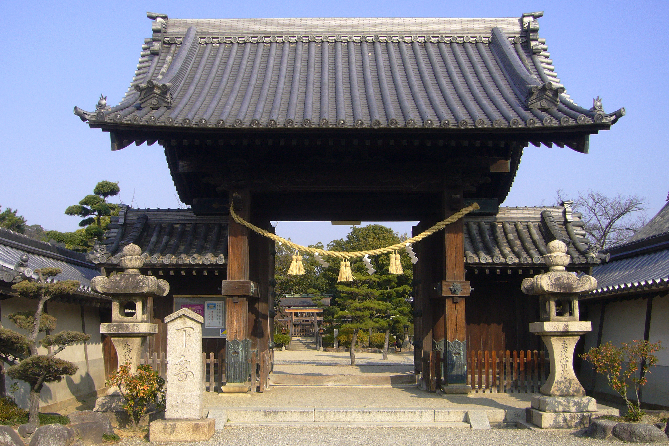 Konda-hachimangu, Habikino, Osaka, Japan